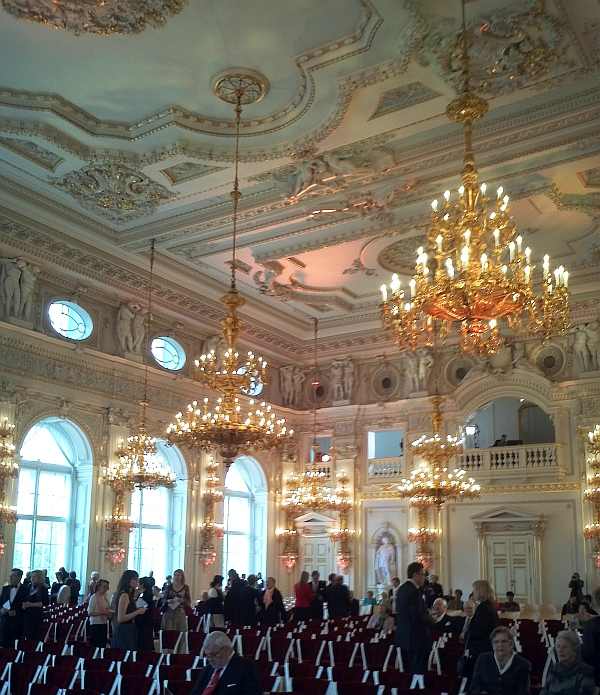 Španělský sál před koncertem Berlínských filharmoniků 1.5.2013